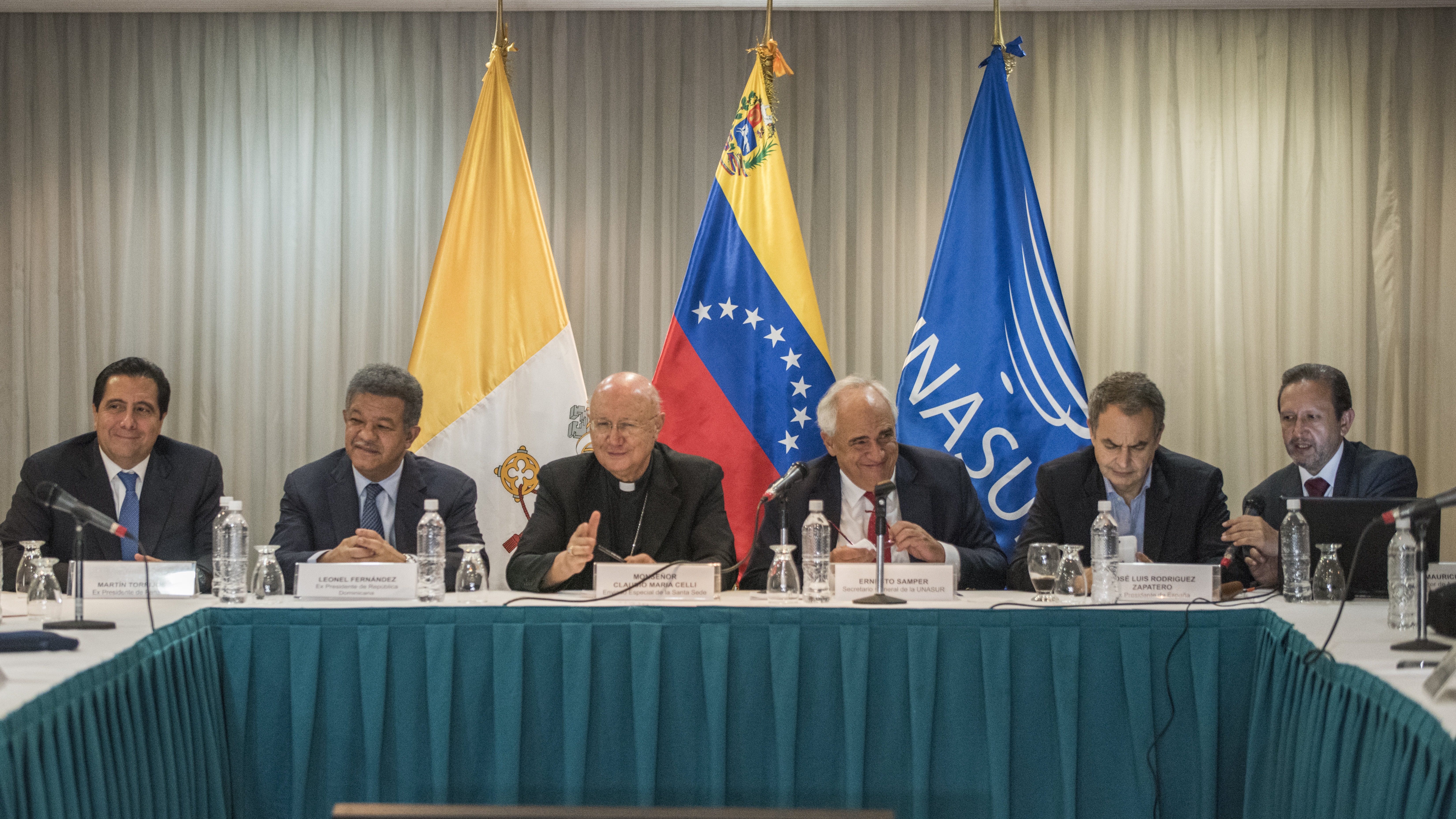 Mesa de diálogo instalada el 12 de Diciembre, 2016. Mediada por el vaticano y la UNASUR, busca acercar a representantes del gobierno de Venezuela con miembros de la MUD (oposición) para destrabar el conflicto político/económico del país.